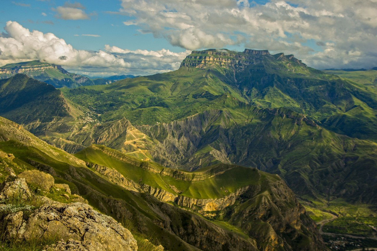 Седло гора на границах Хунзахского и Гунибского районов в Дагестане